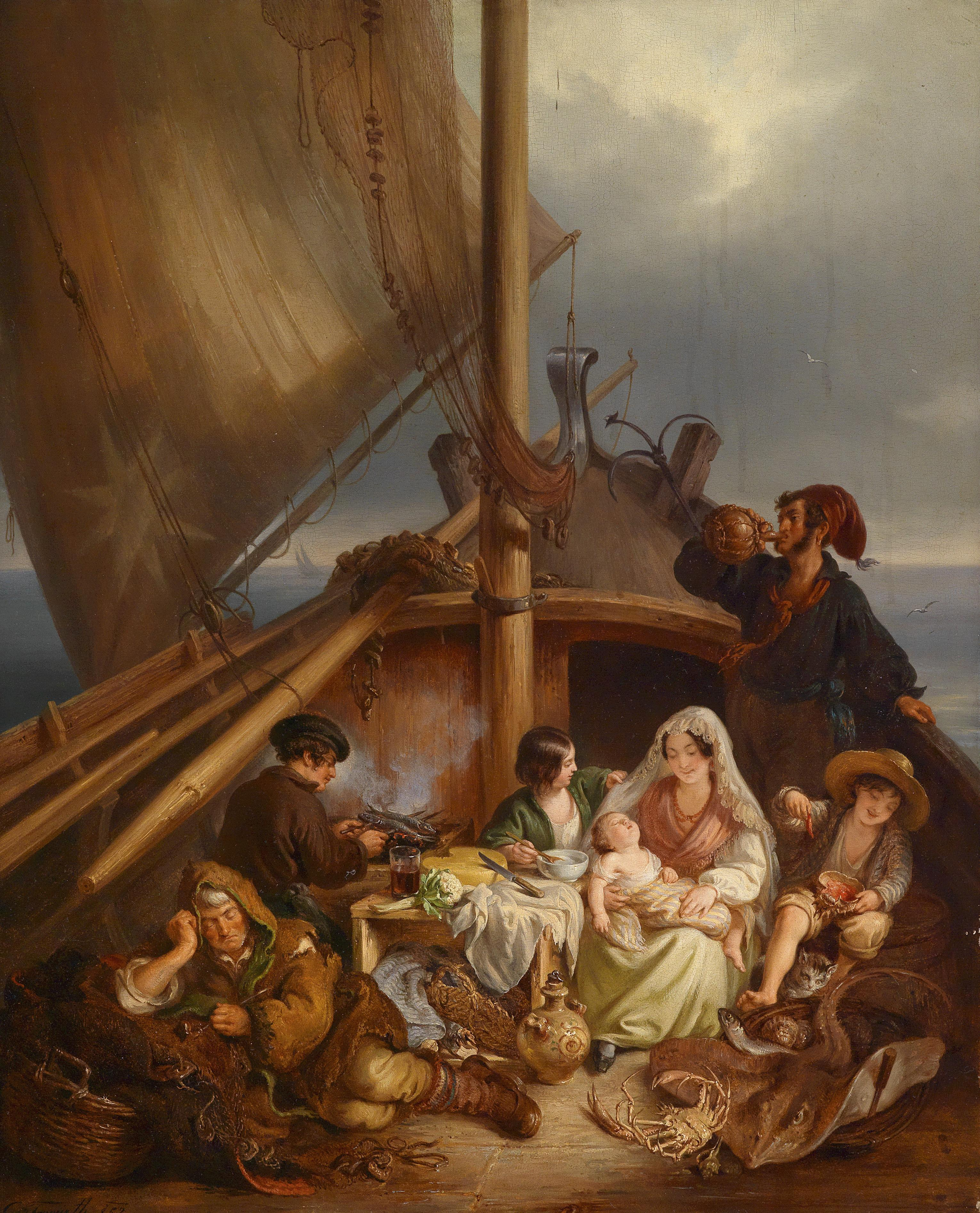 Fischerfamilie, signiert und datiert C. Fruwirth (1)852, Öl auf Holz, 64×52 cm